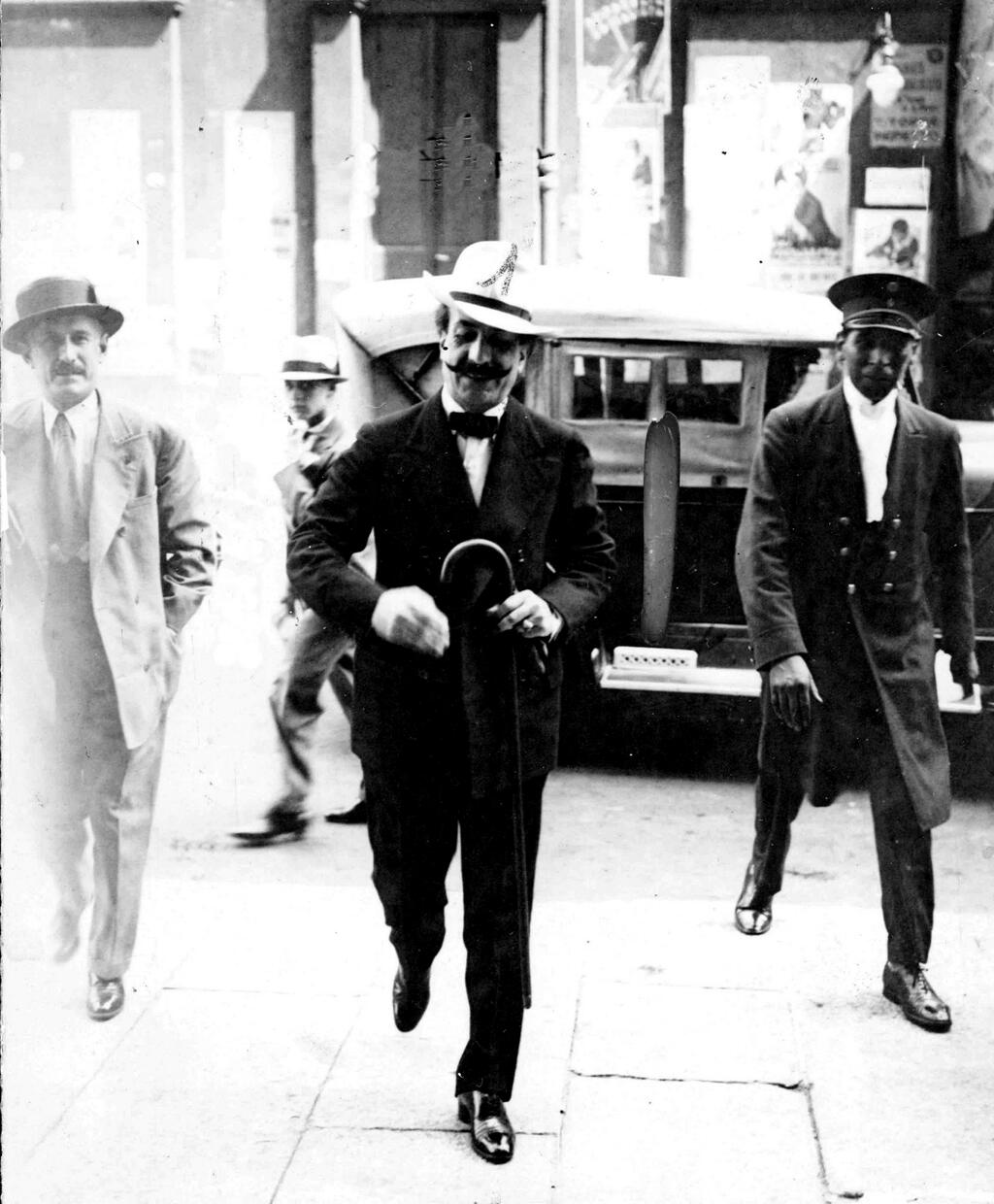 Senador Alfredo Palacios entrando al Congreso de la Nación, 1932. Disponible en el Archivo General de la Nación (Argentina). Documento Fotográfico. Inventario 62510.